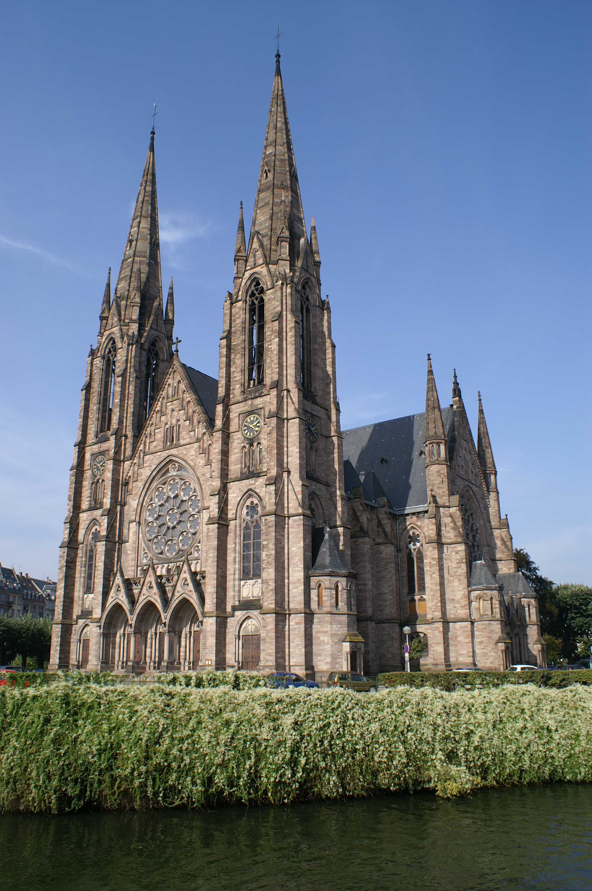 Eglise Saint Paul - Facade /St Paul church - Facade - Strasbourg - France